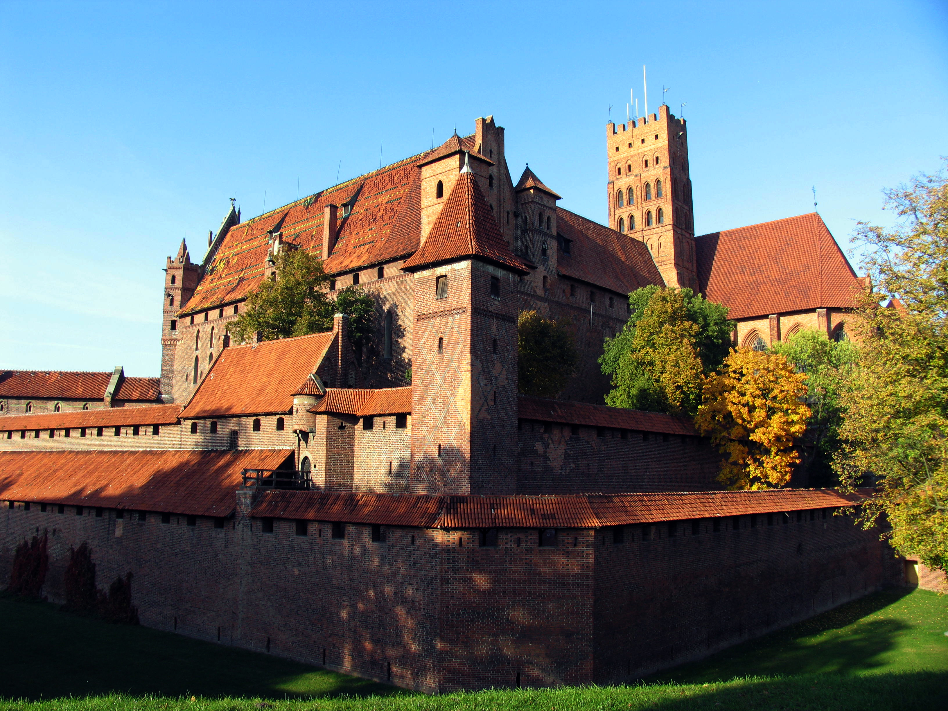 Malbork, zespół zamku krzyżackiego, XIII, XIX